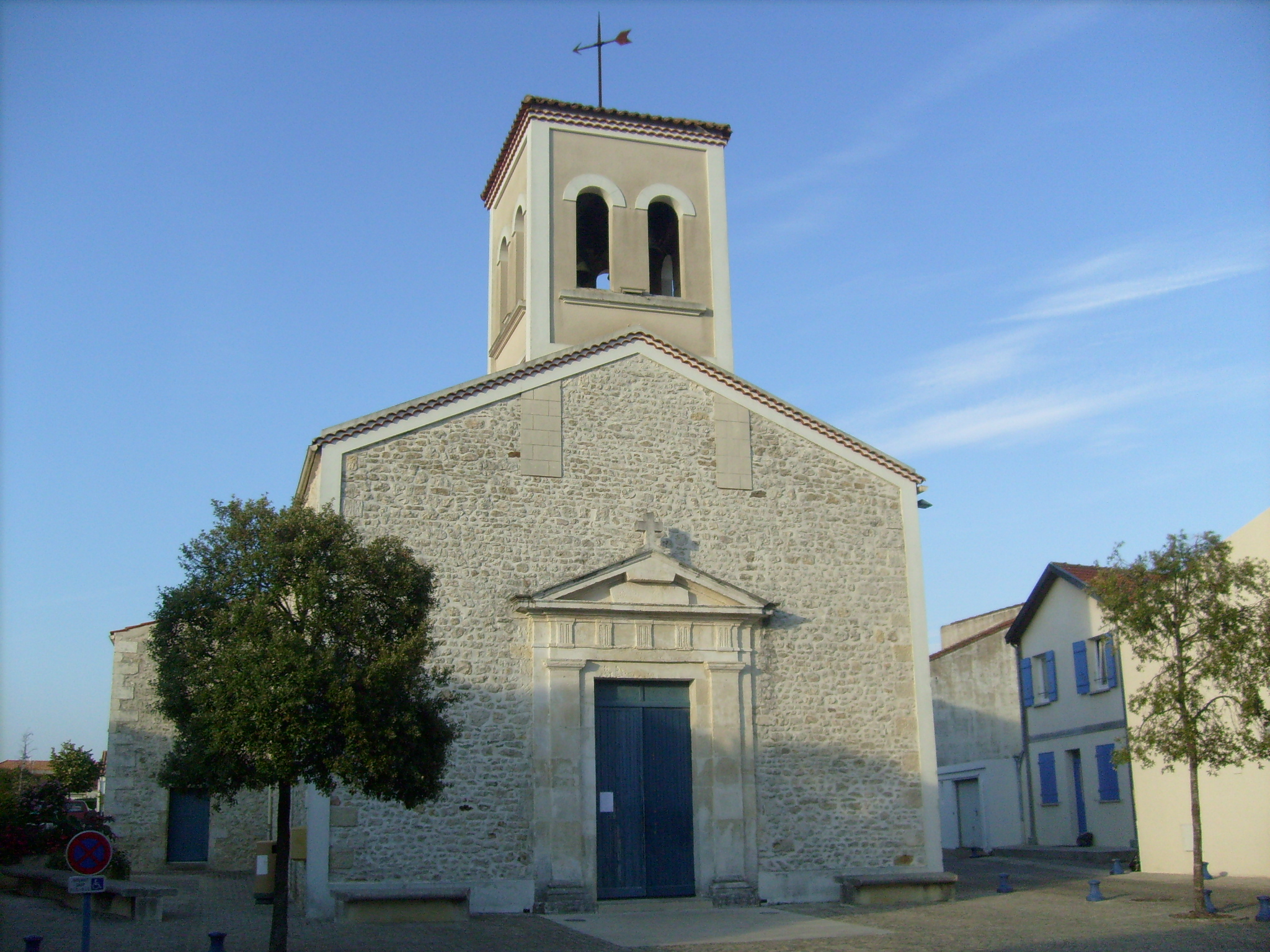 Eglise Saint-Louis de Bourcefranc